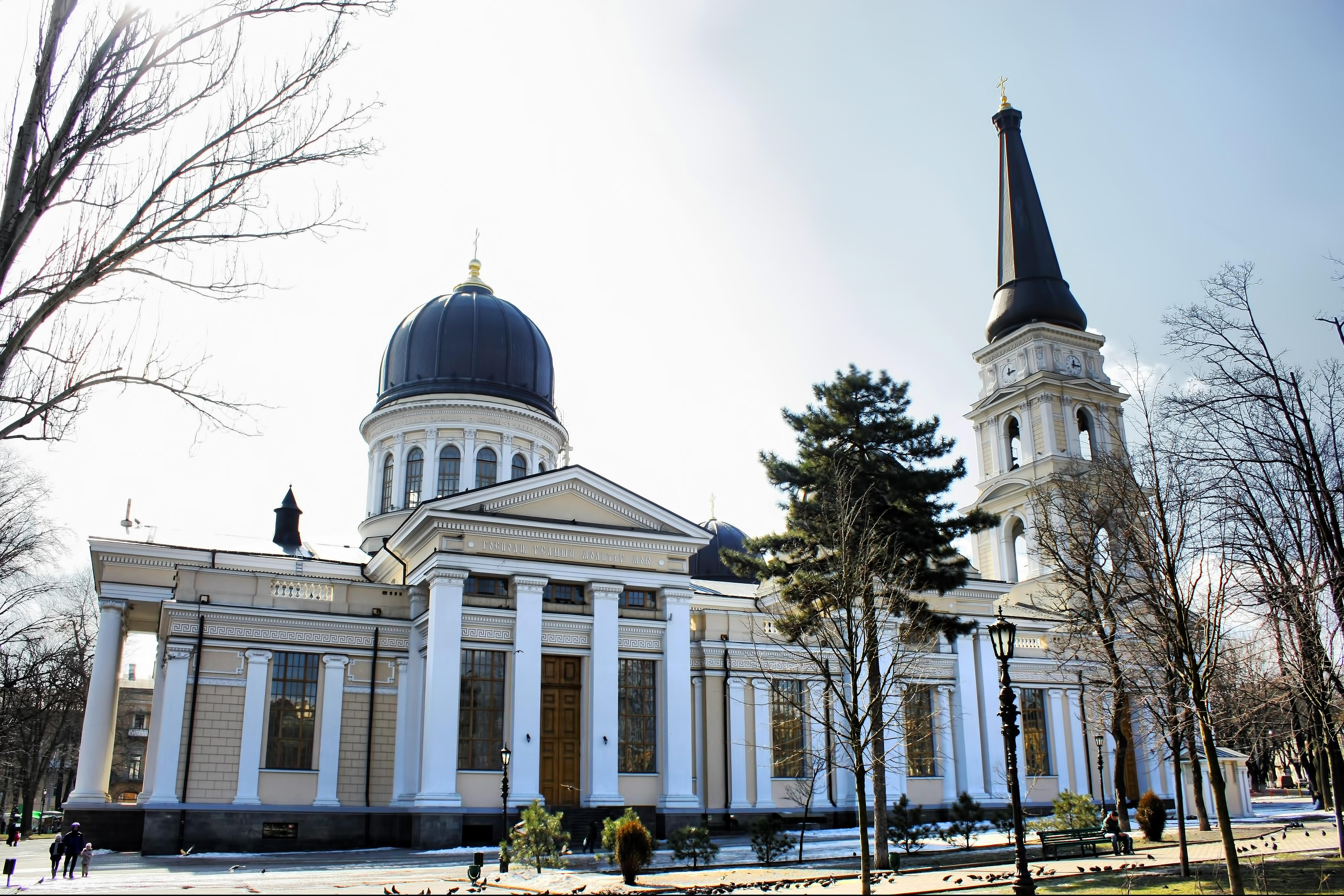 Будівля Спасо-Преображенського собору, де поховано видатних людей м. Одеси й Південного регіону України – князя М.С. Воронцова та княгиню Є.К. Воронцову, Одеса, Соборна пл., 3